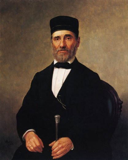 רבי יששכר בר (ברנרד) אילווי